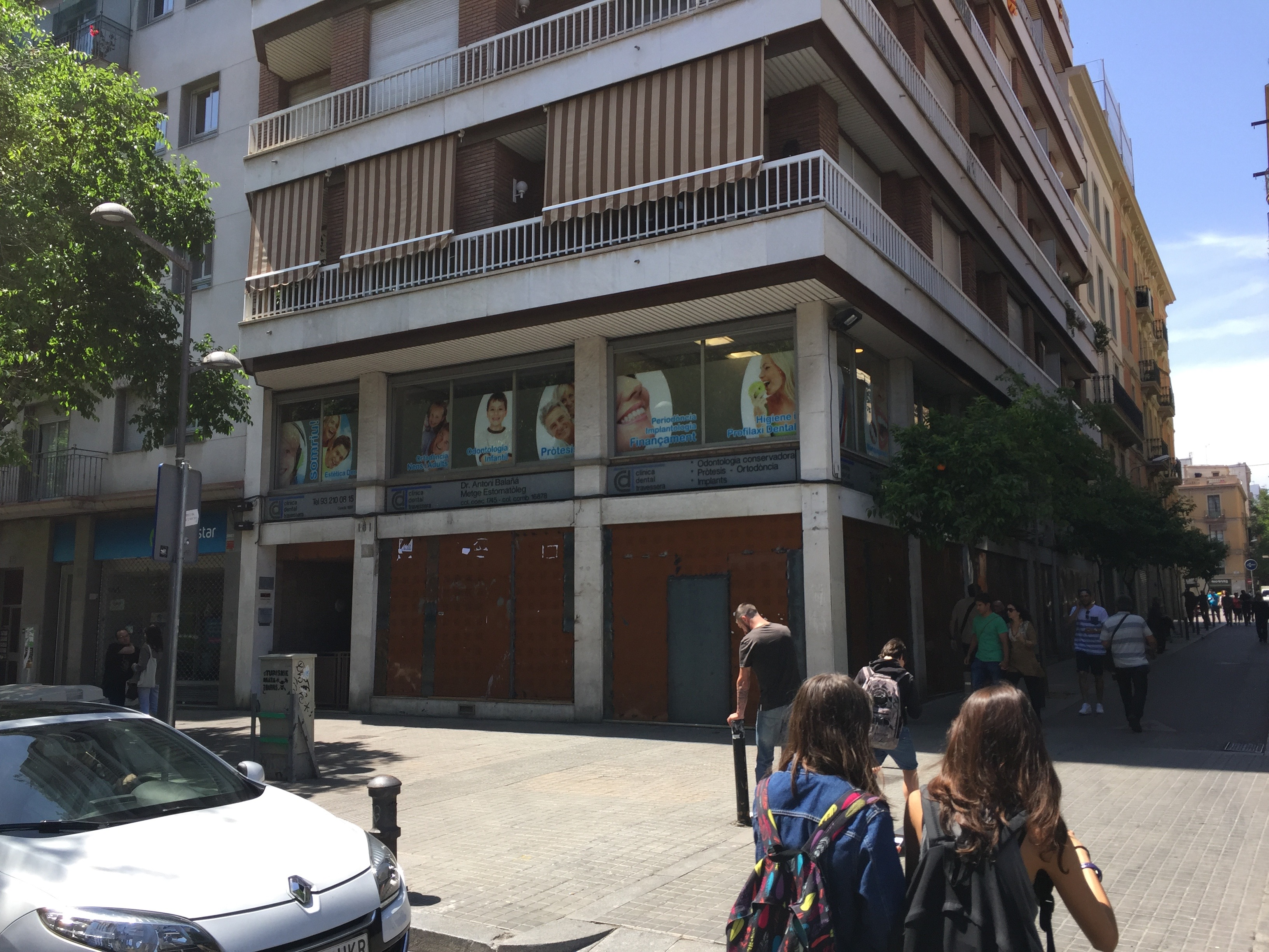 Banc Expropiat protegit